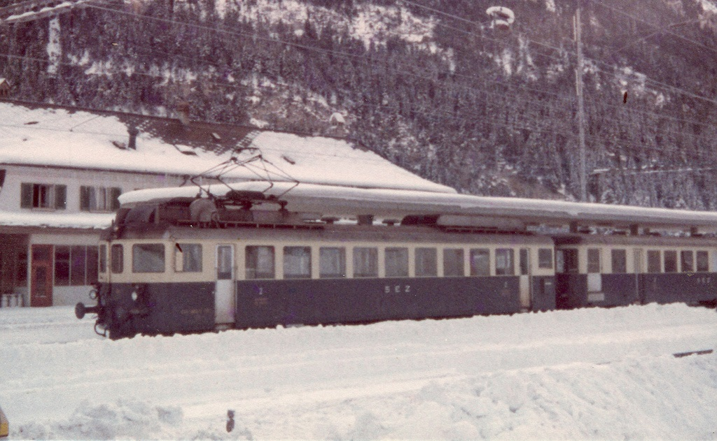 SEZ-Triebwagen ABDe 2/8 701 in Kandersteg